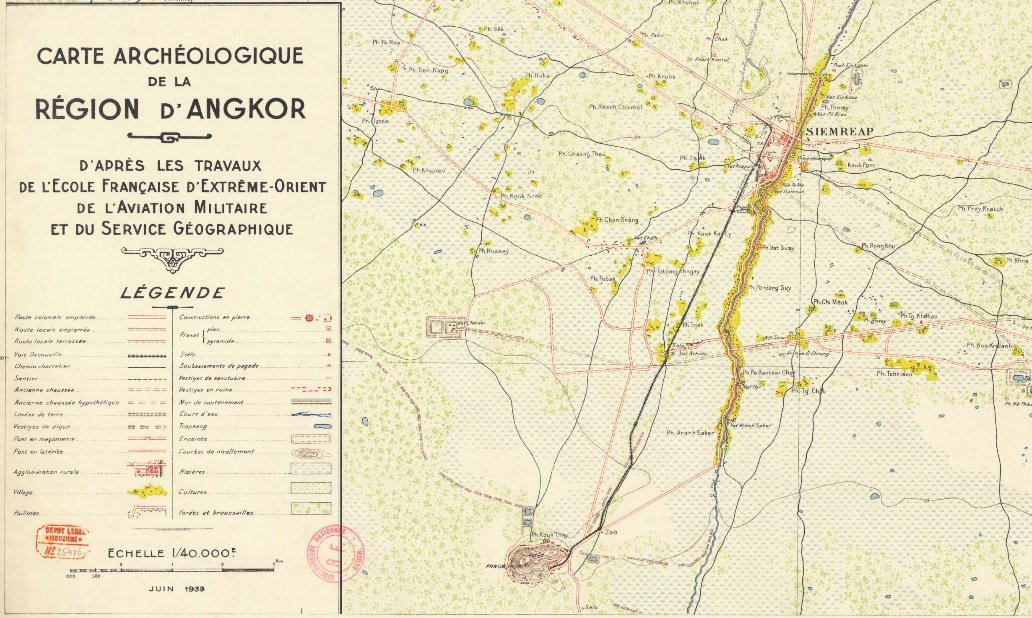 Carte Archéologique de la Région d'Angkor - D'après le travaux de l'École Française d'Extrême-Orient de l'Aviation Militaire et du Service Géographique (Juin 1939)